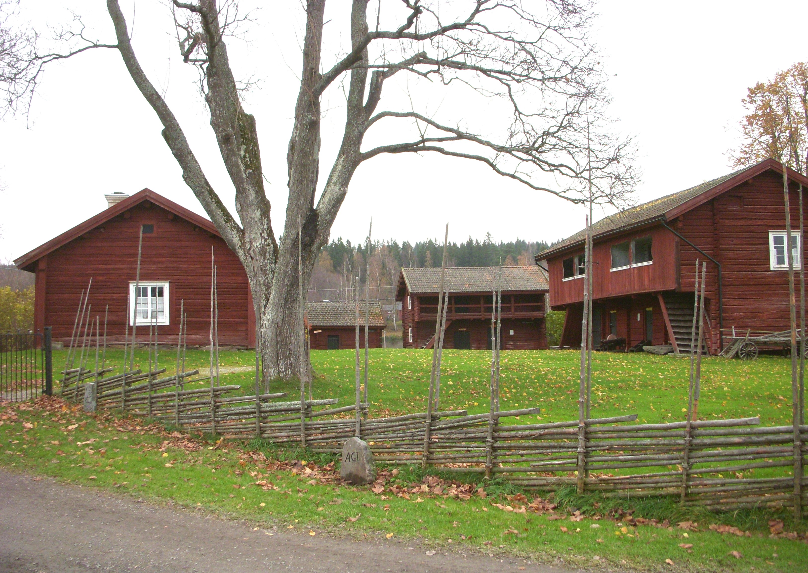 Ludvika Gammelgård, bergsmansgården